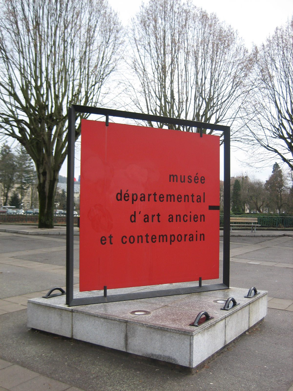 Musée départemental d'art ancien et contemporain d'Épinal (France)